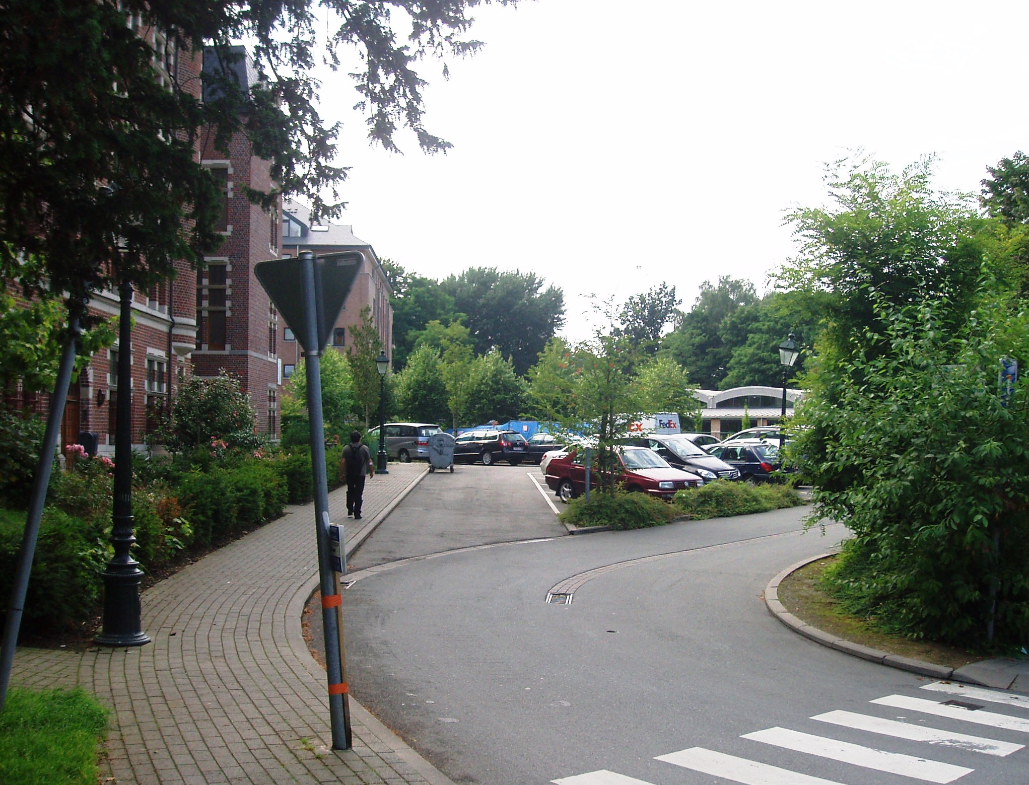 clos des Trois Fontaines Auderghem Belgium